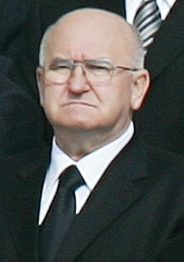 Борислав Паравац, сахрана папе Јована Павла II